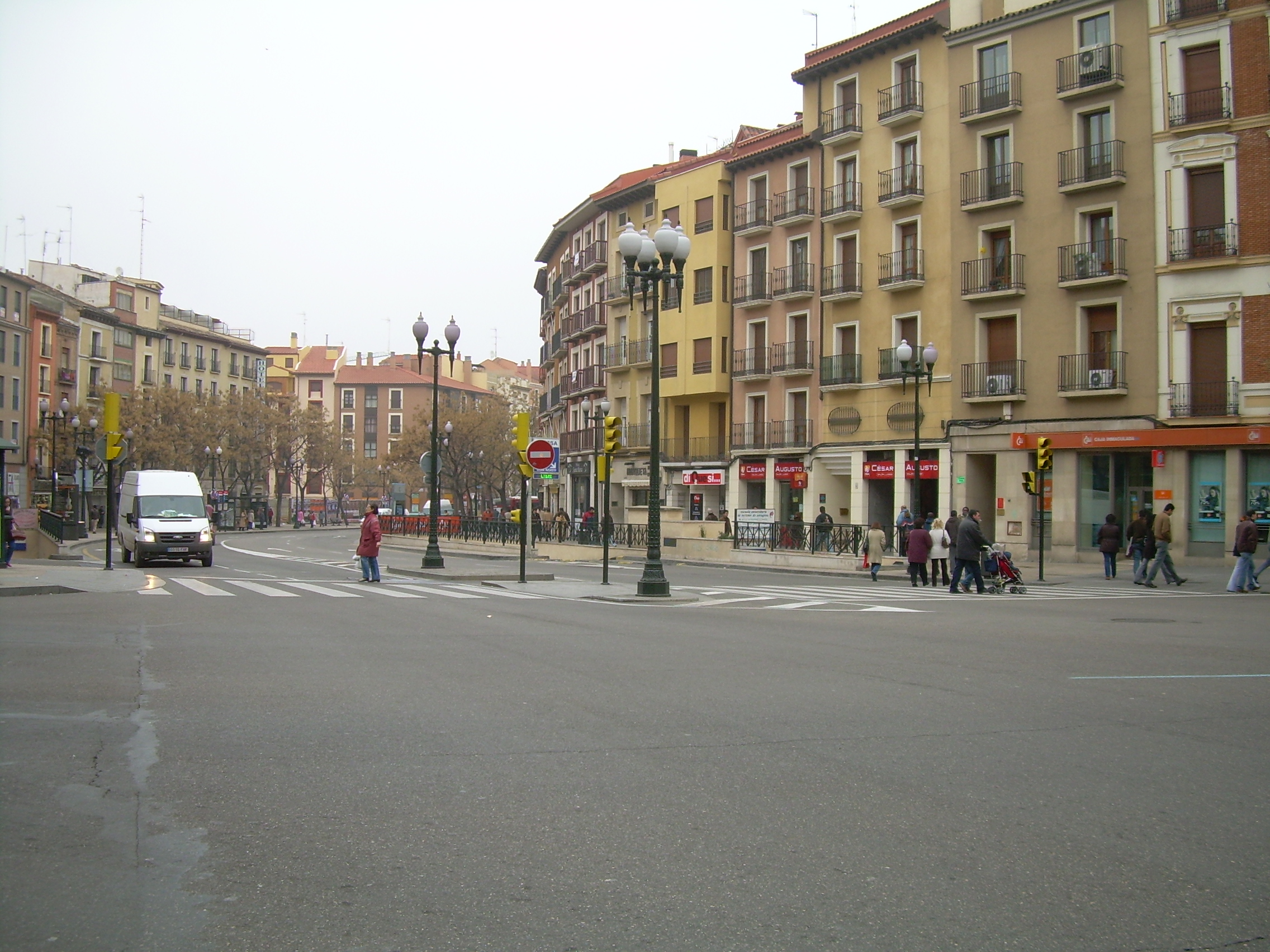 Avenida de César Augusto, Zaragoza. Situación Google Maps